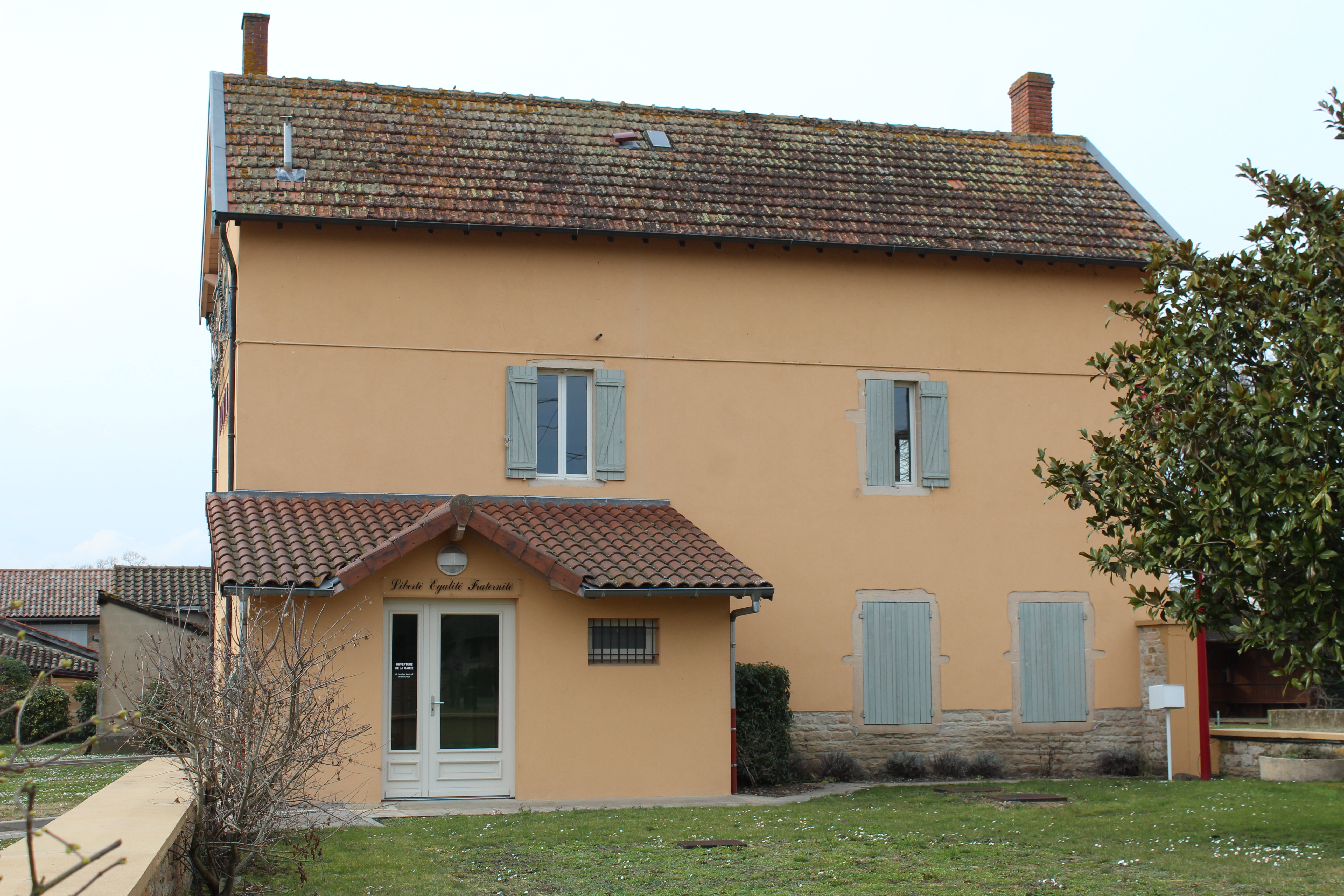 Mairie d'Asnières-sur-Saône.